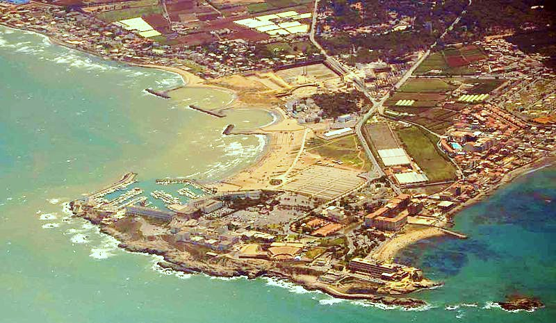 Vue aérienne de Sidi Fredj, le 26 juin 2013